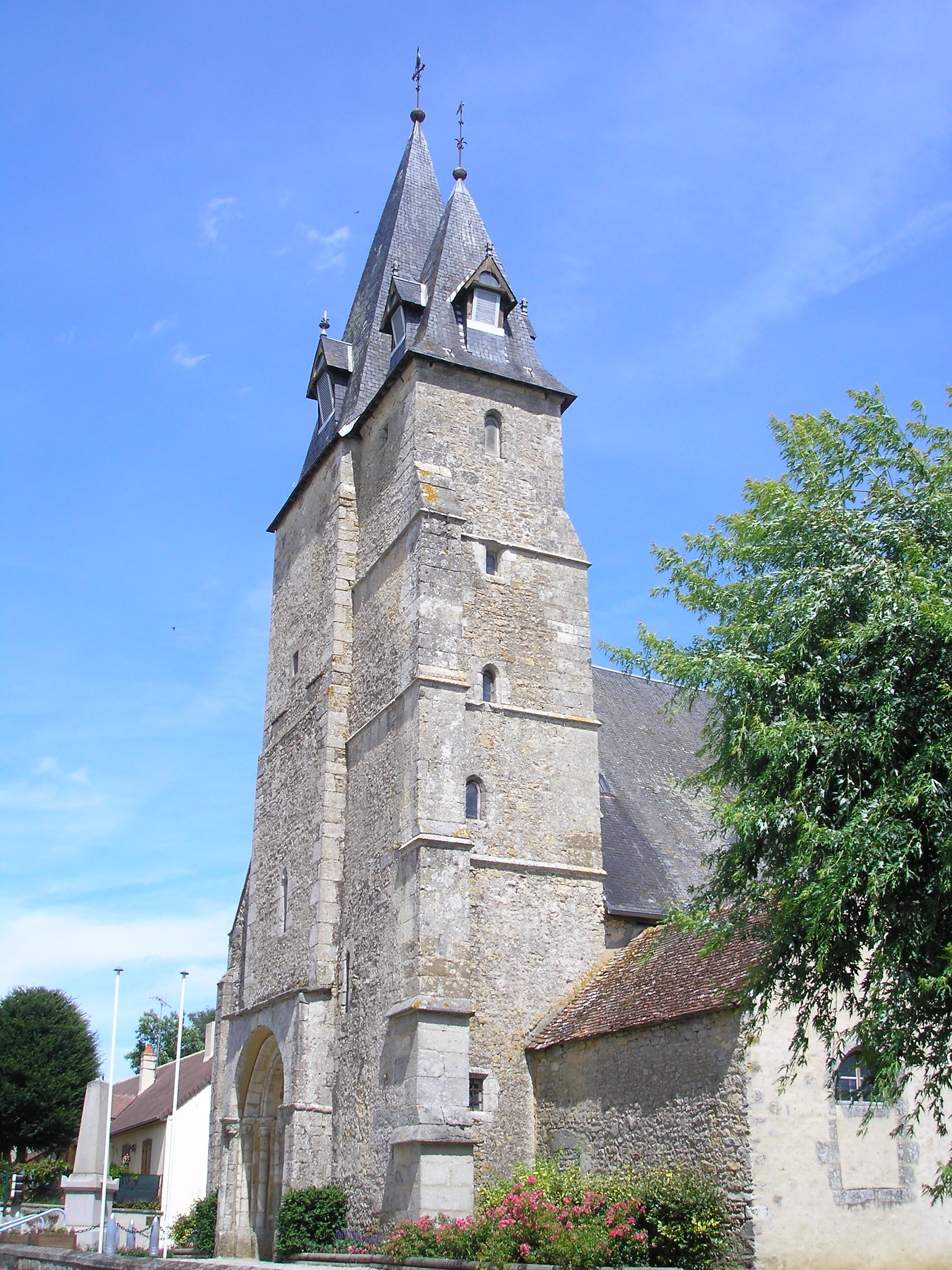 Essay (Normandie, France). L'église Saint-Pierre-et-Saint-Paul.